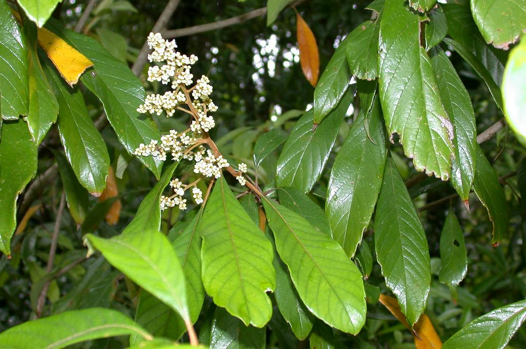 Meliosma rigida：ヤマビワ 2003/05/26 和歌山県すさみ町：Susami Town, Wakayama Pref. Japan